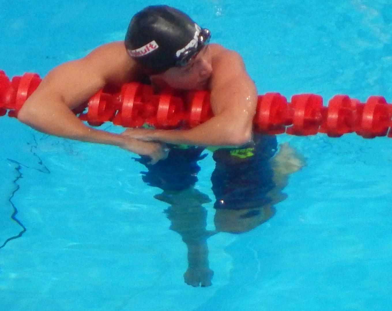 Александра Герасименя на чемпионате мира в Казани